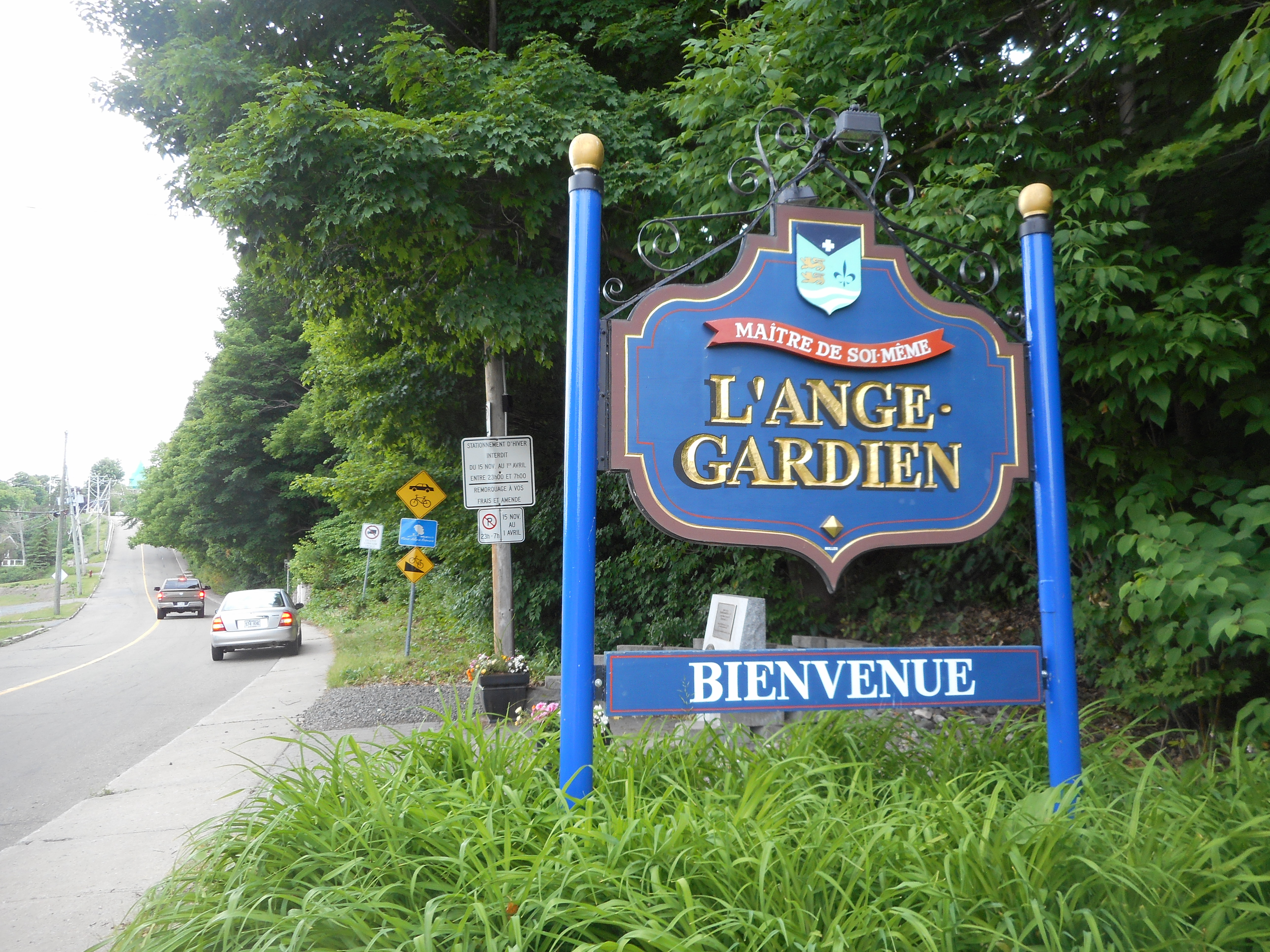 Panneau de bienvenue à l'entrée de la municipalité de L'Ange-Gardien